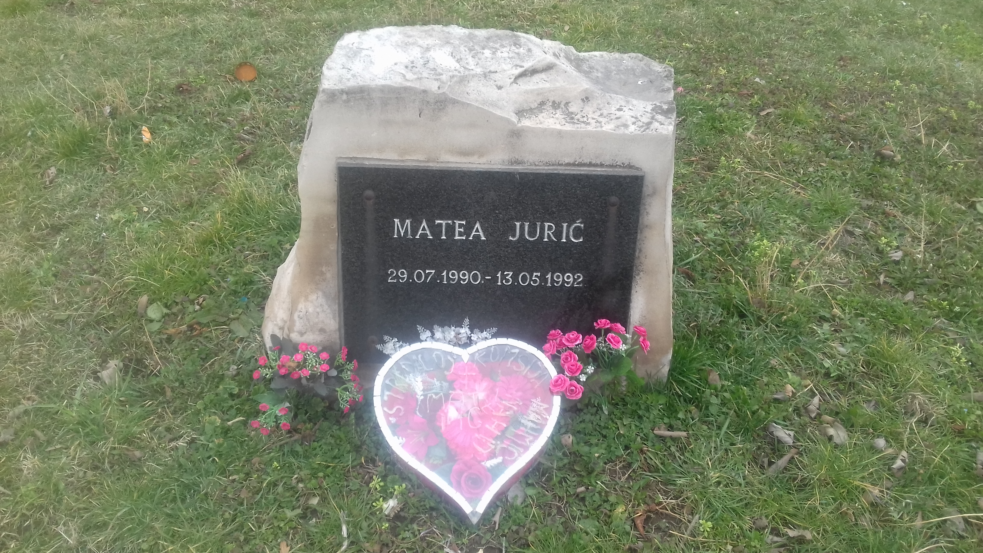 Спомен камен и плоча са положеним цвијећем испред, за Матеу Јурић — прву жртву Рата у БиХ у Зеници, која је тада имала непуне двије године